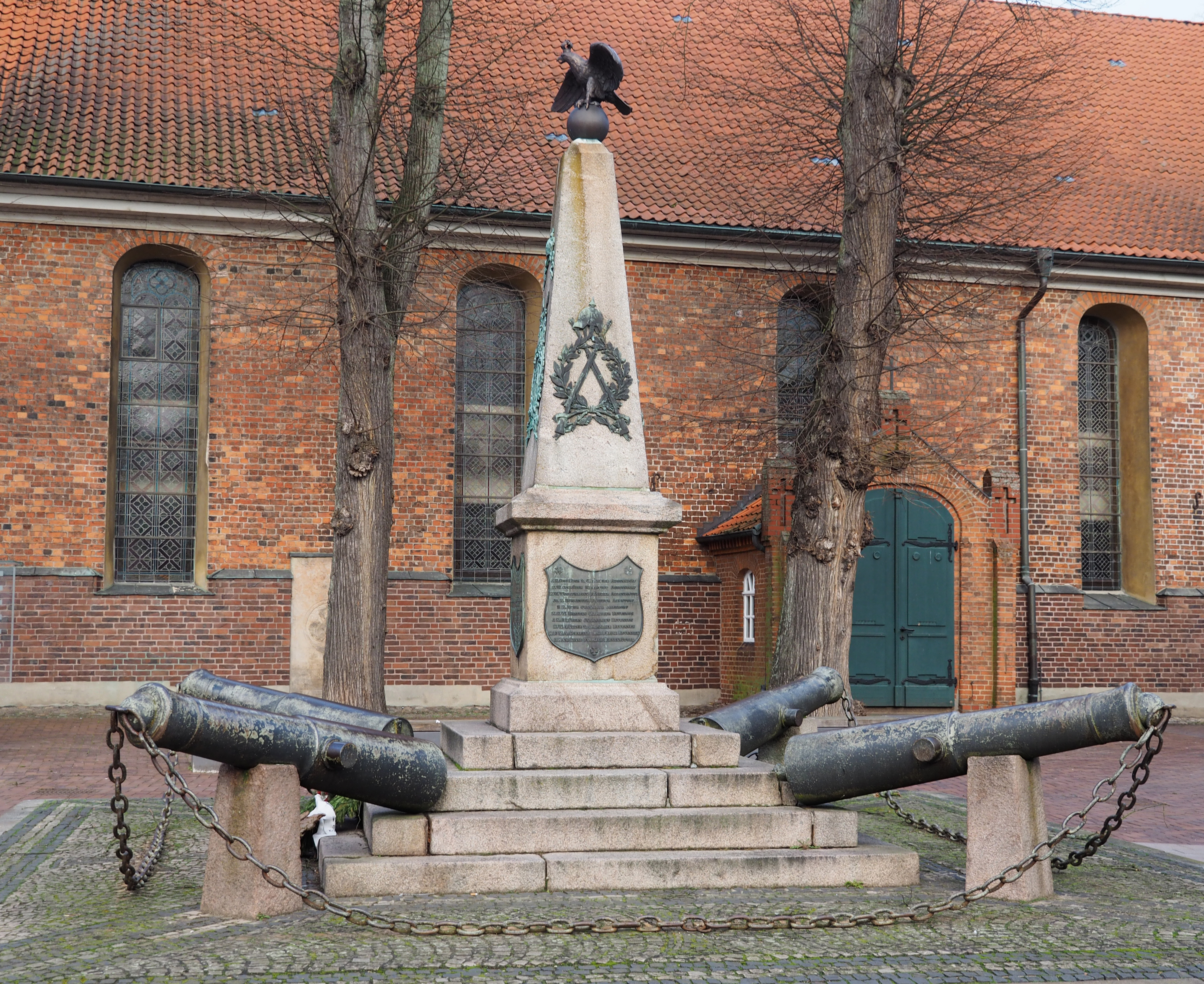 In Bad Bevensen, Kriegerdenkmal zu Ehren der Gefallenen im Deutsch/Französischen Krieg 1870/71, mit vier Kanonen erbeutet im Krieg von 1864 gegen Dänemark.